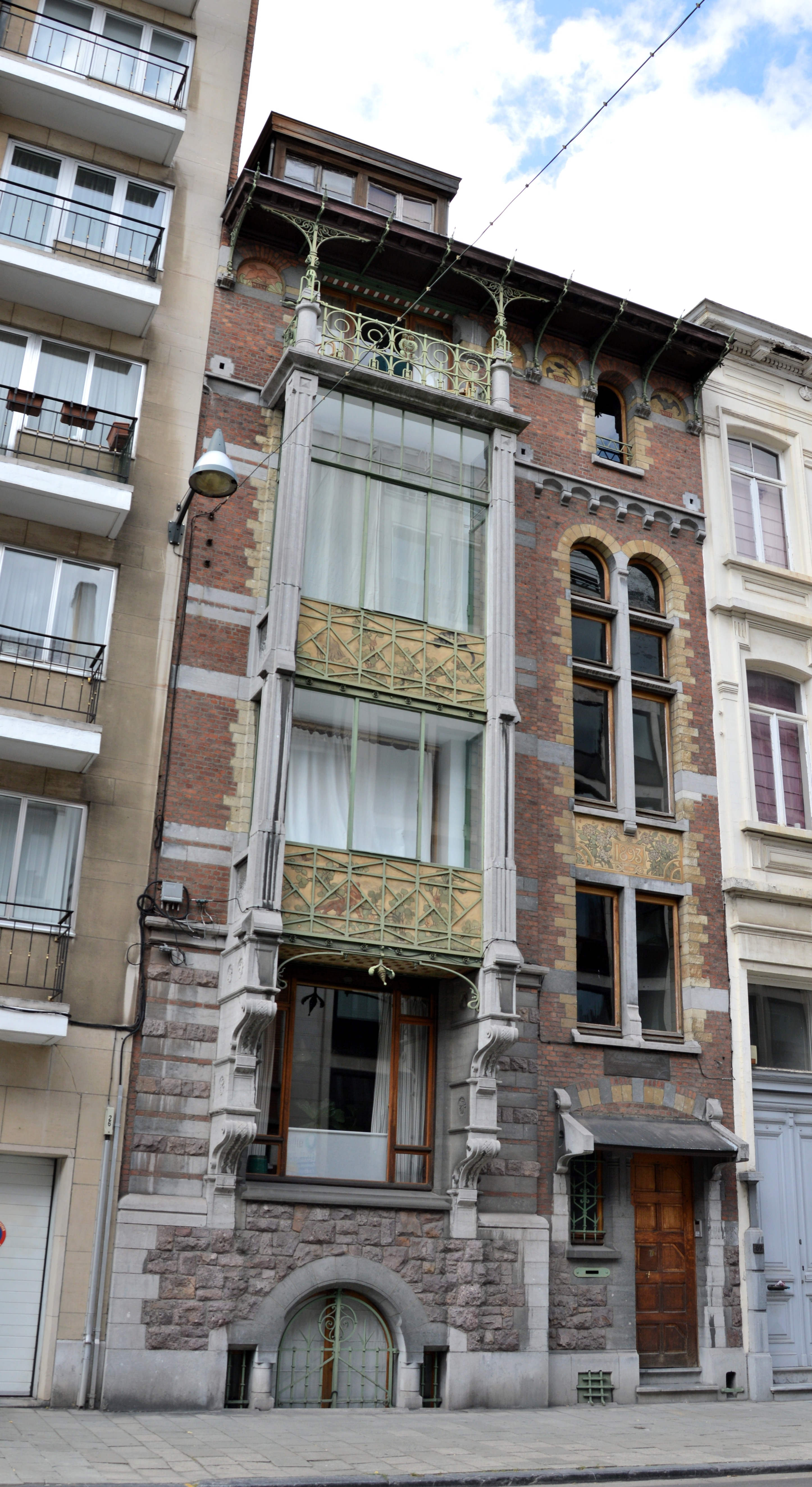 Rue Defaczq, 71 à Saint-Gilles.